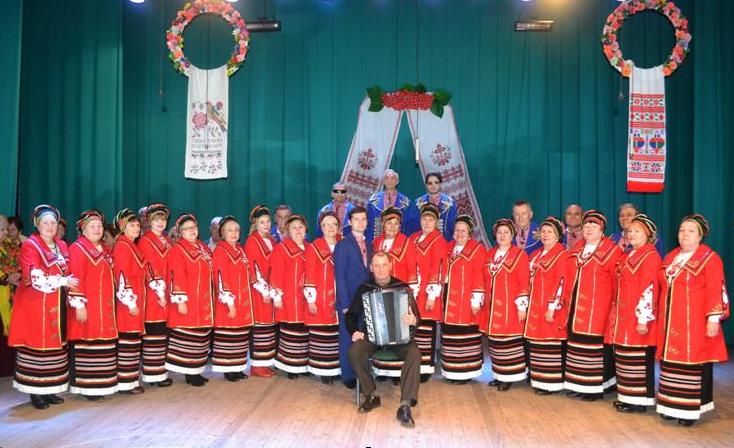 колектив